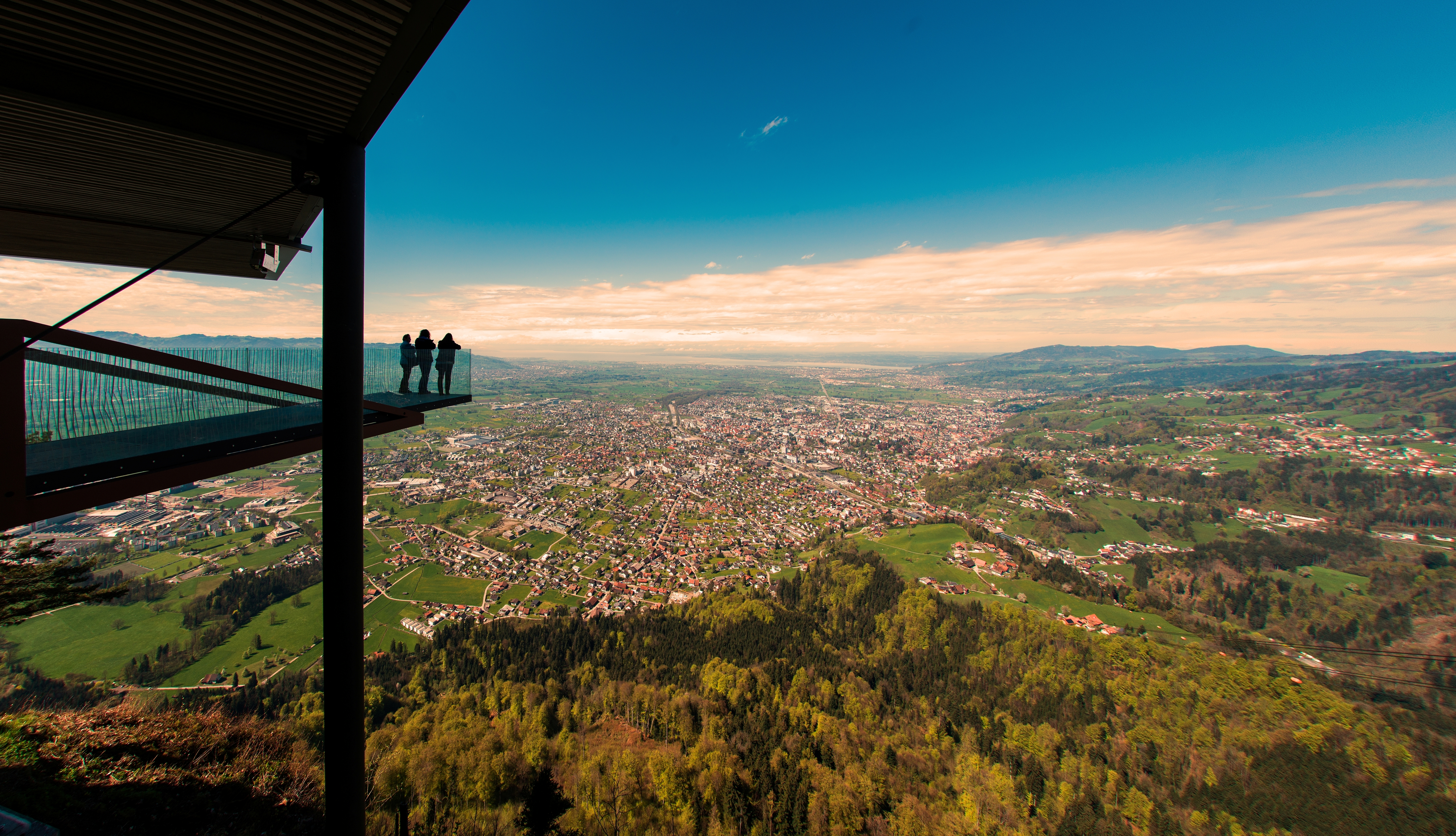 die Karrenkante in Dornbirn.